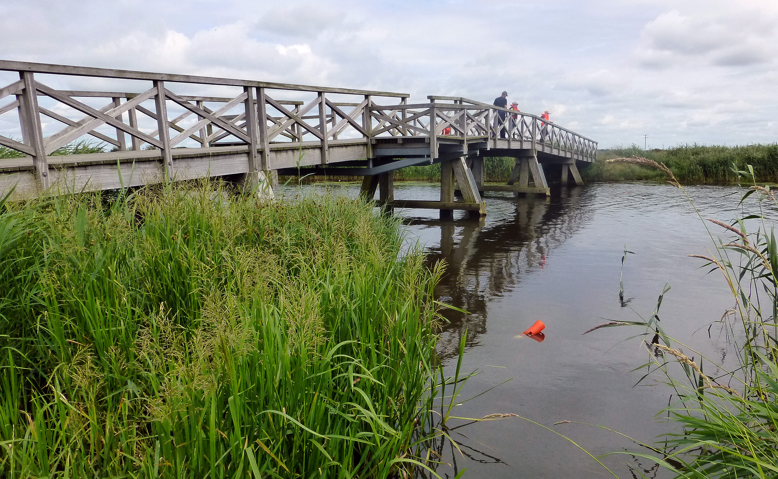 Vonå Engbro over Vonå i Ringkøbing Skjern Kommune